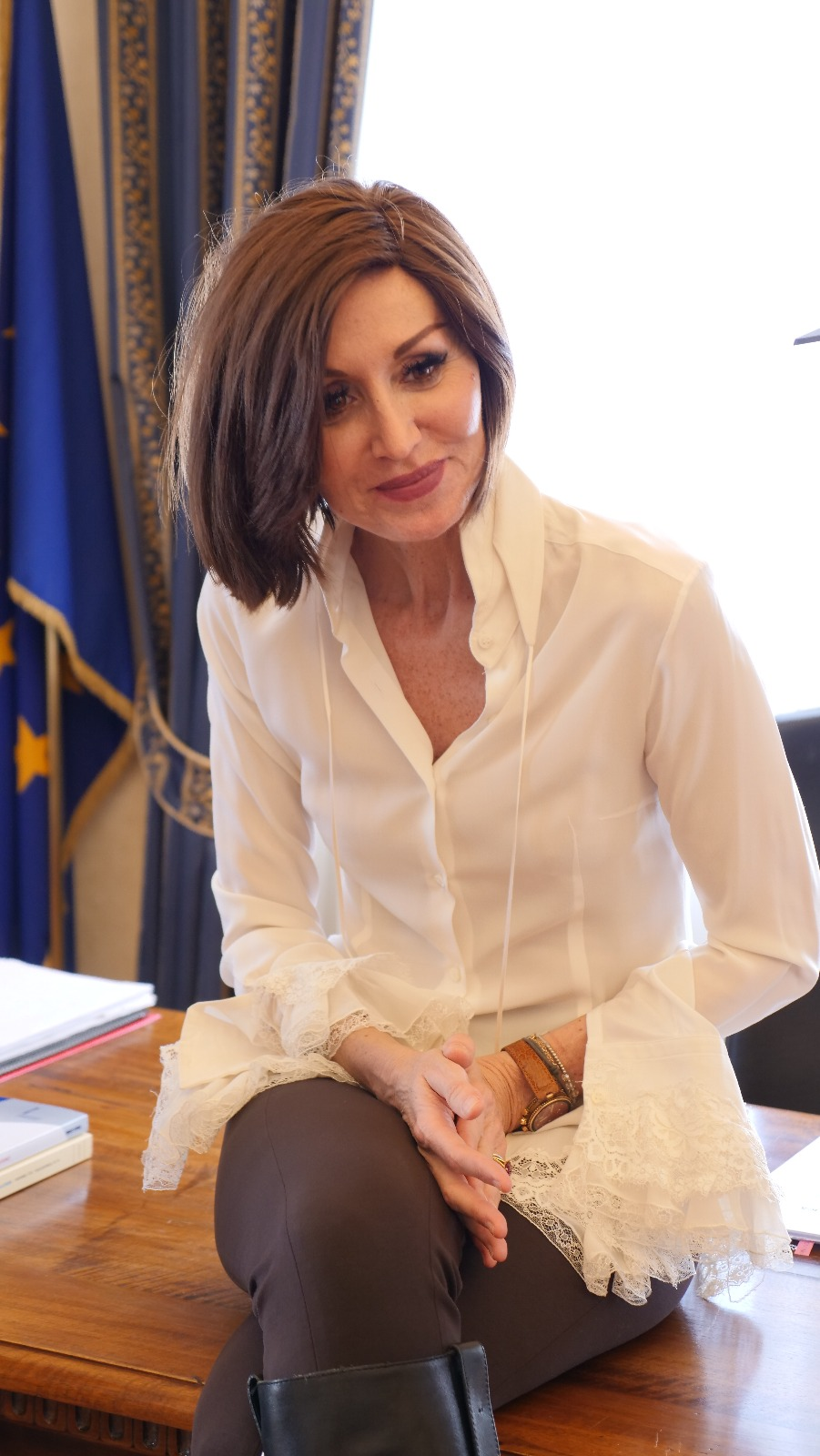 Senatrice Bernini nel suo ufficio al Senato della Repubblica